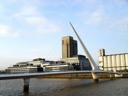 Puente de la Mujer (Buenos Aires)